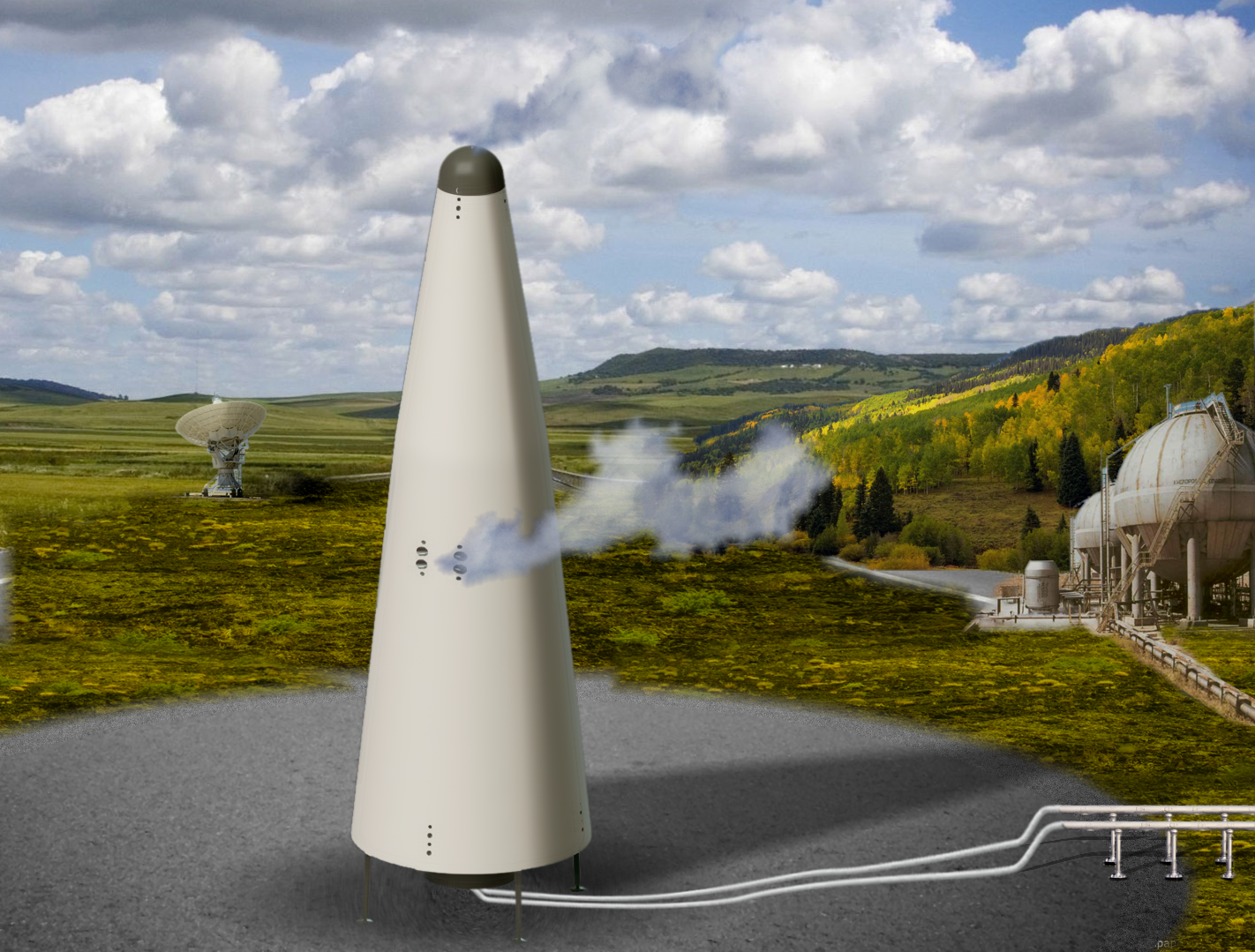 Одноступенчатая многоразовая РН КОРОНА на взлетно-посадочной площадке космодрома